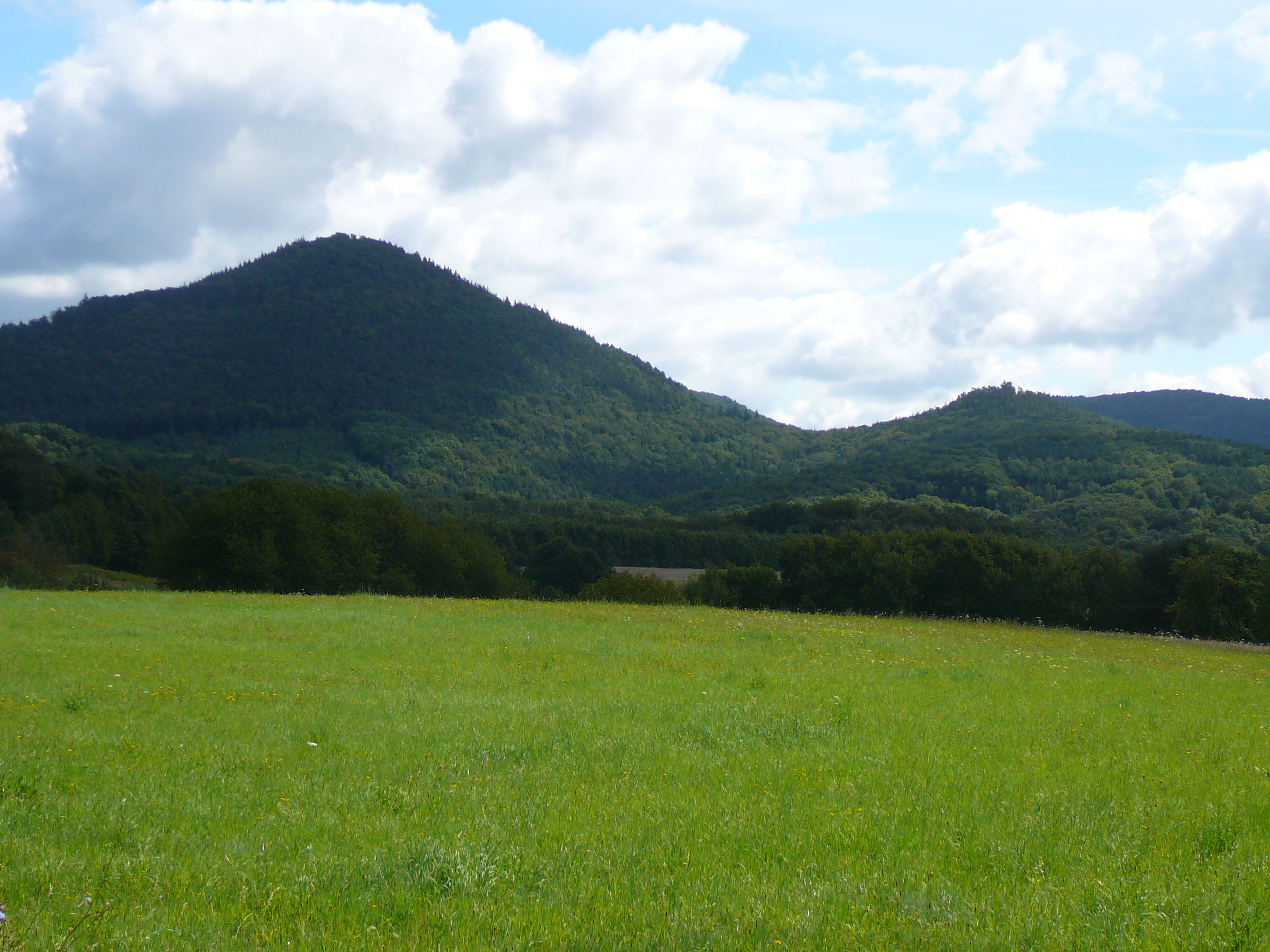 Landwirtschaftlich genutzte Verebnungsflächen zwischen Völkersweiler und Waldrohrbach: Im Hintergrund Rehberg und kleiner Hahnstein (links)